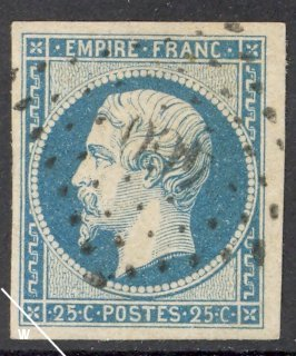 stamp France / timbre poste français 1853 - 25c "empire"